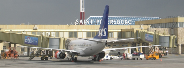 Boeing-737 у телетрапа. Аэропорт Пулково, Россия.